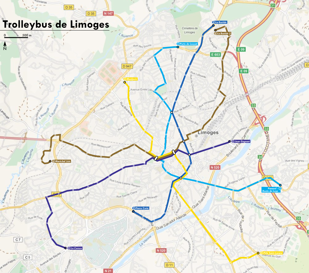 Plan des lignes de trolleybus de Limoges (France)